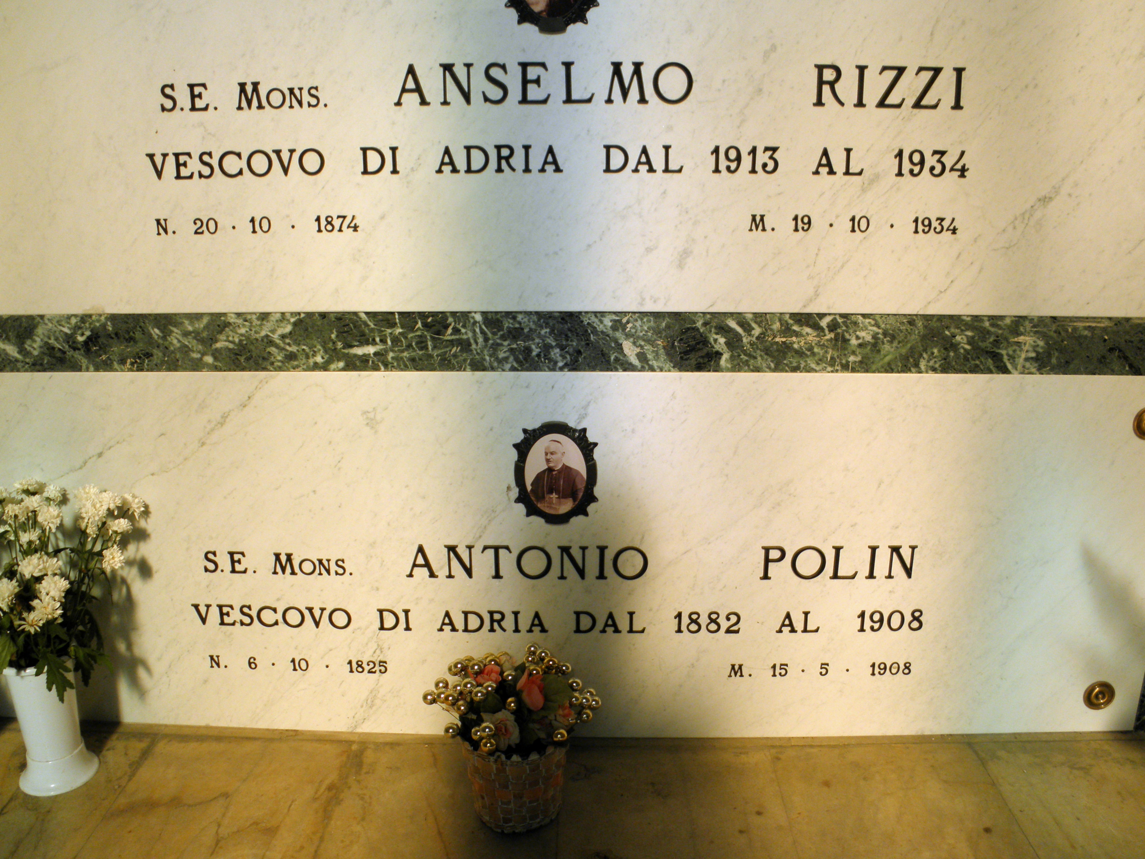 Cimitero di Rovigo, la tomba la tomba di Monsignor Antonio Polin, Vescovo della Diocesi di Adria dal 25 settembre 1882 al 18 maggio 1908.